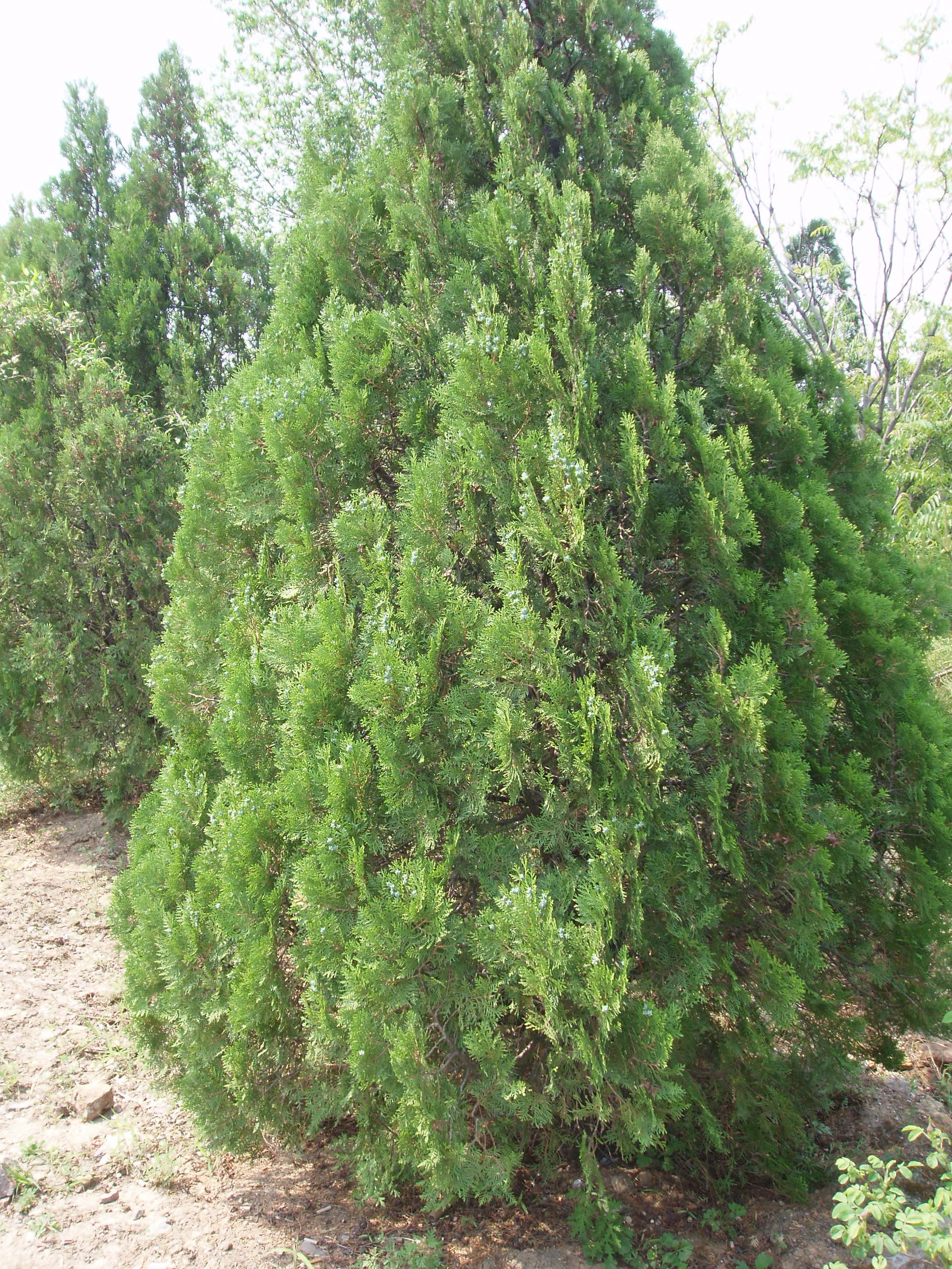 Oriental arborvitae, Chinese arborvitae